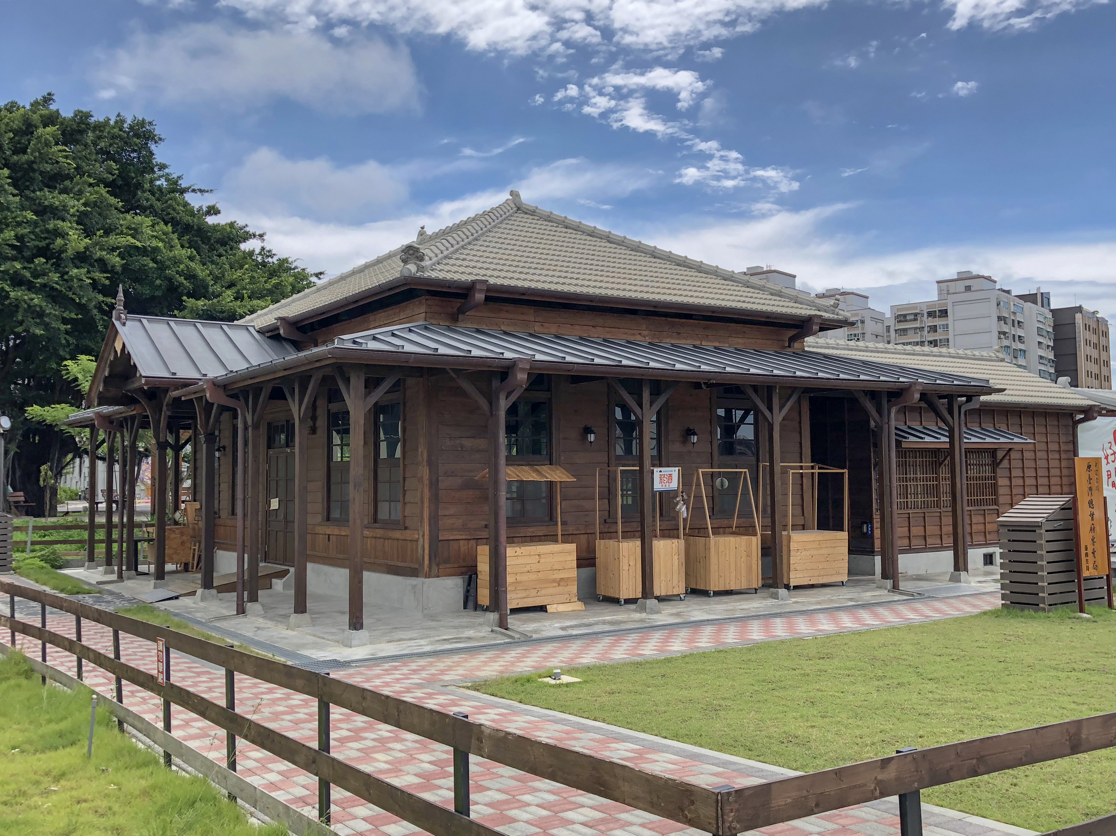 修復後之臺灣總督府專賣局臺南支局鹽埕分室外觀。